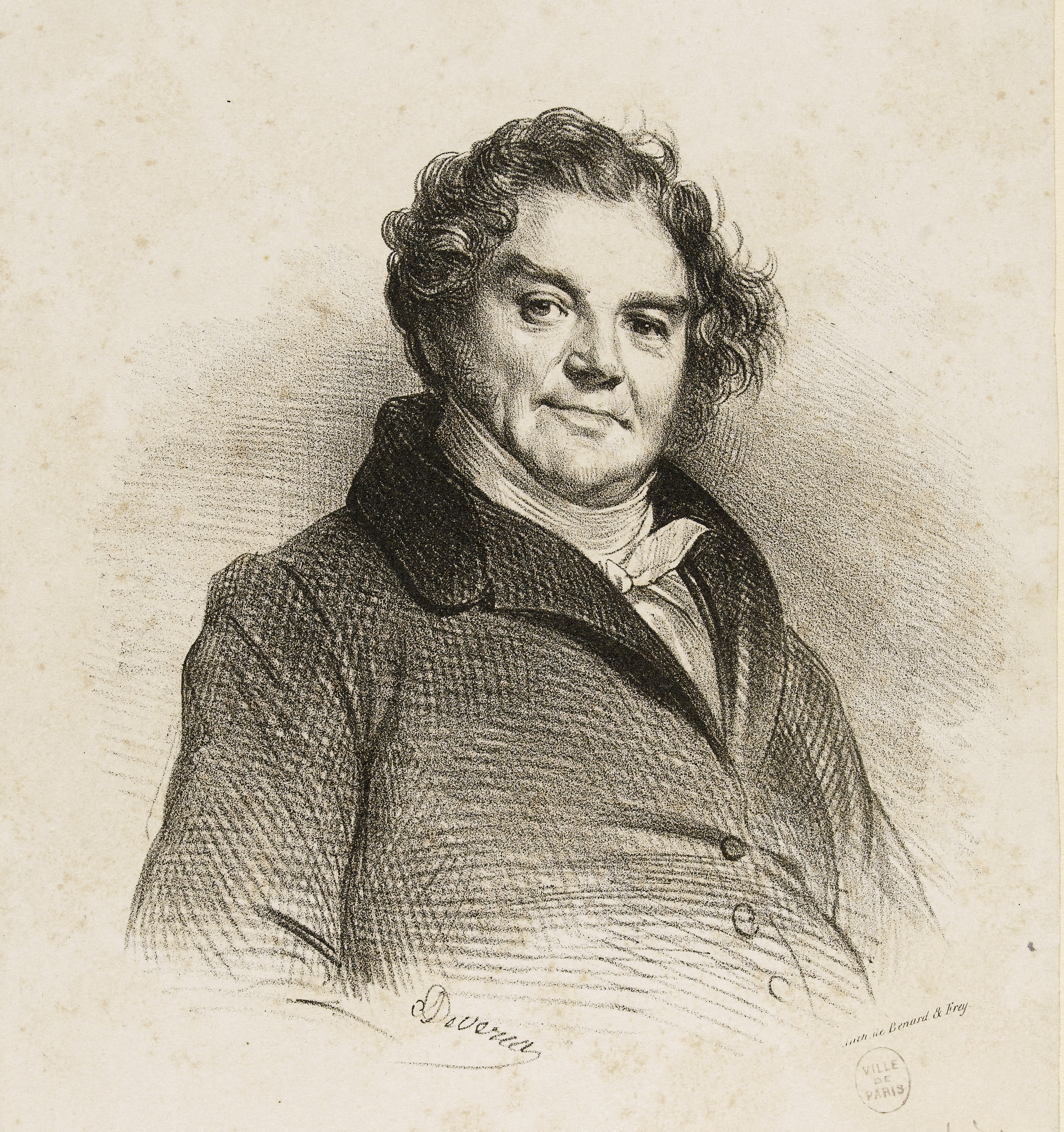 Lithographie représentant Eugène François Vidocq. Portrait dessiné par Achille Devéria, vers 1828.